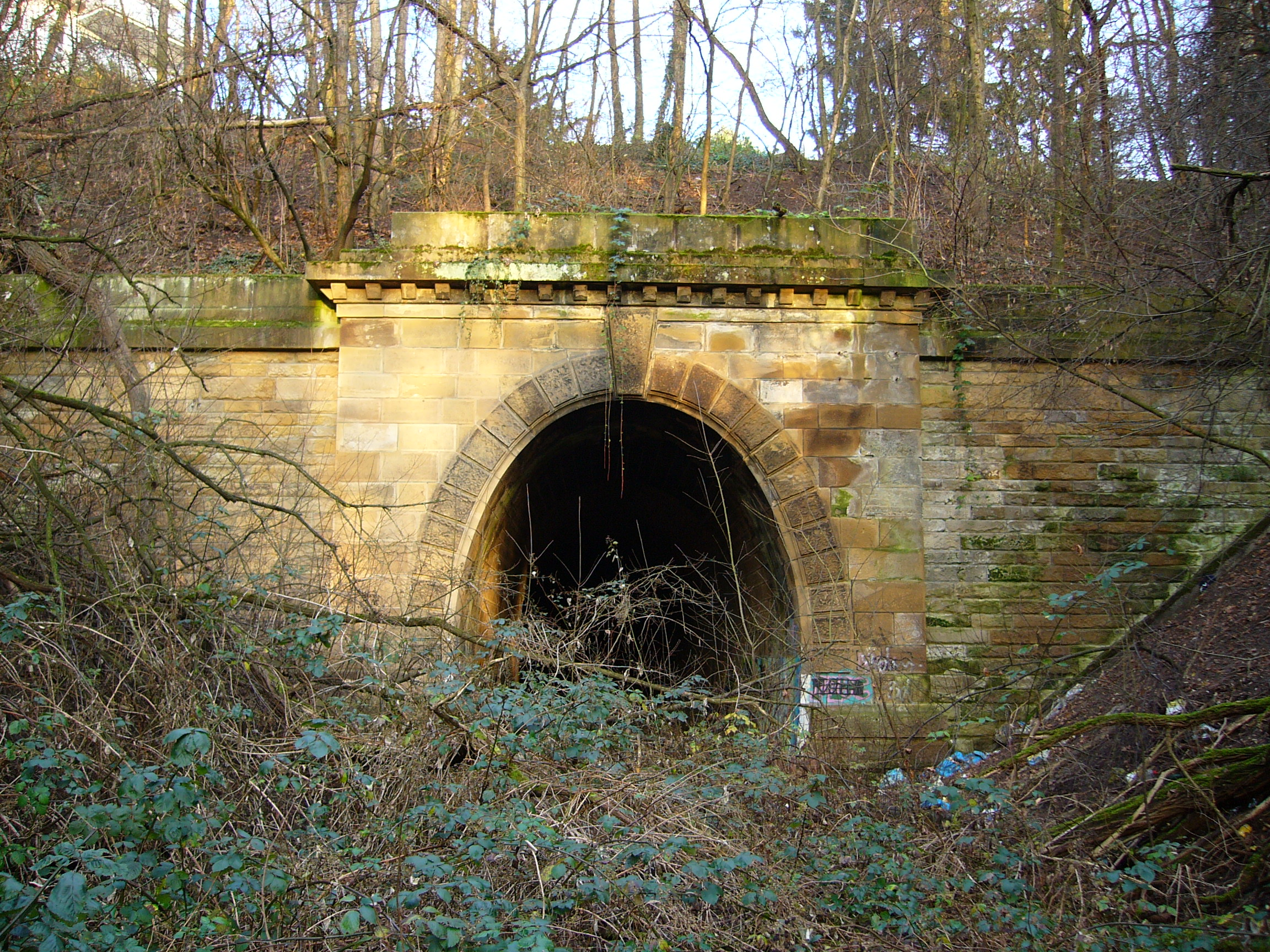 Das Portal des Lerchenbergtunnels.